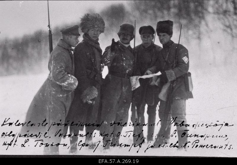 Vabadussõda. Kalevlaste Maleva juhid maleva väljaõppel Lasnamäel. Vasakult: 2. roodu pealik lipnik Otto Tief, kuulipildujate roodu pealik reamees Anton Õunapuu, maleva pealik lipnik Leopold Tõnson, lipnik Johan Triumph, jalamaakuulajate komando pealik lipnik Konstantin Pomerants (detsember 1918).